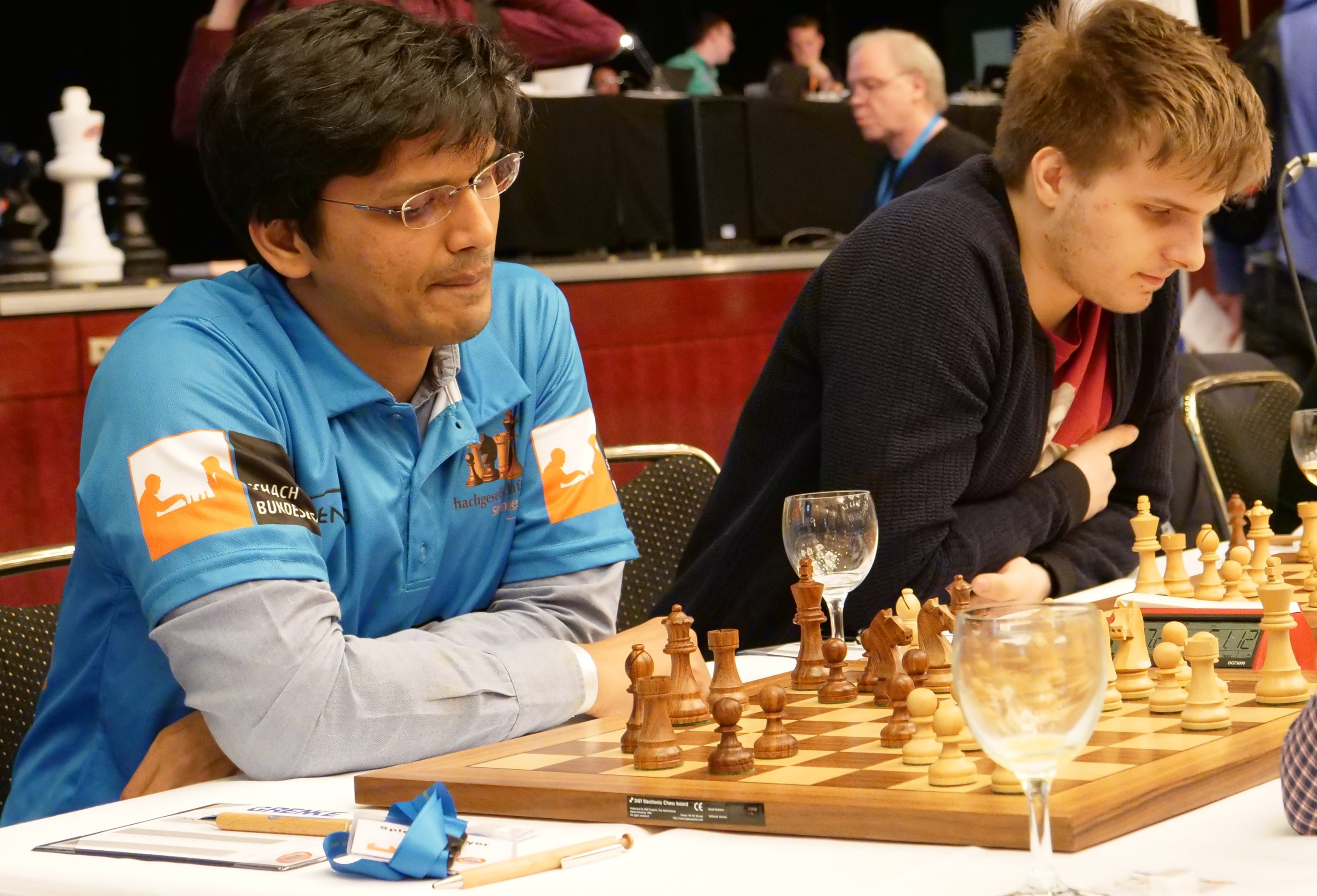 Harikrishna und Rapport Bundesliga-Finalrunde 30-4-2018